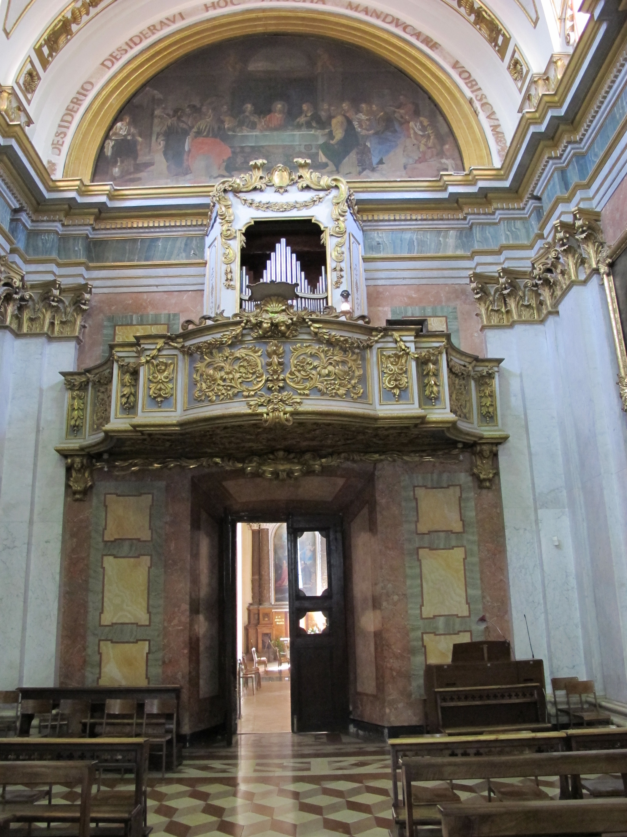 Asisi, san rufino, interno, cappella del sacramento di giacomo giorgetti, 1663